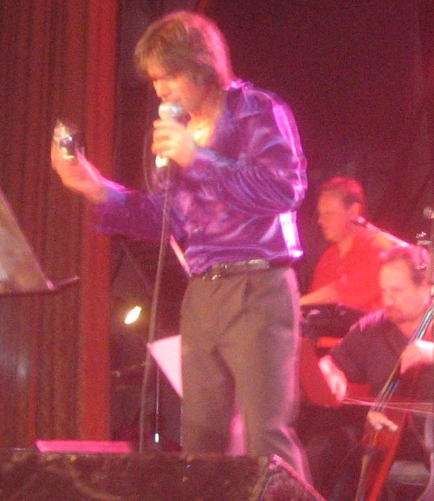 Neil Diamond